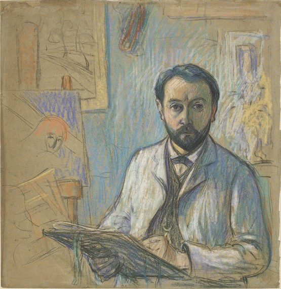 Autoportrait dans l'atelier, en train de dessiner, pastel and black crayon on gray paper.